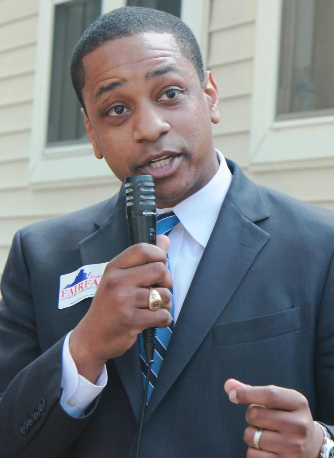 leedemsopeningday2013 (36)